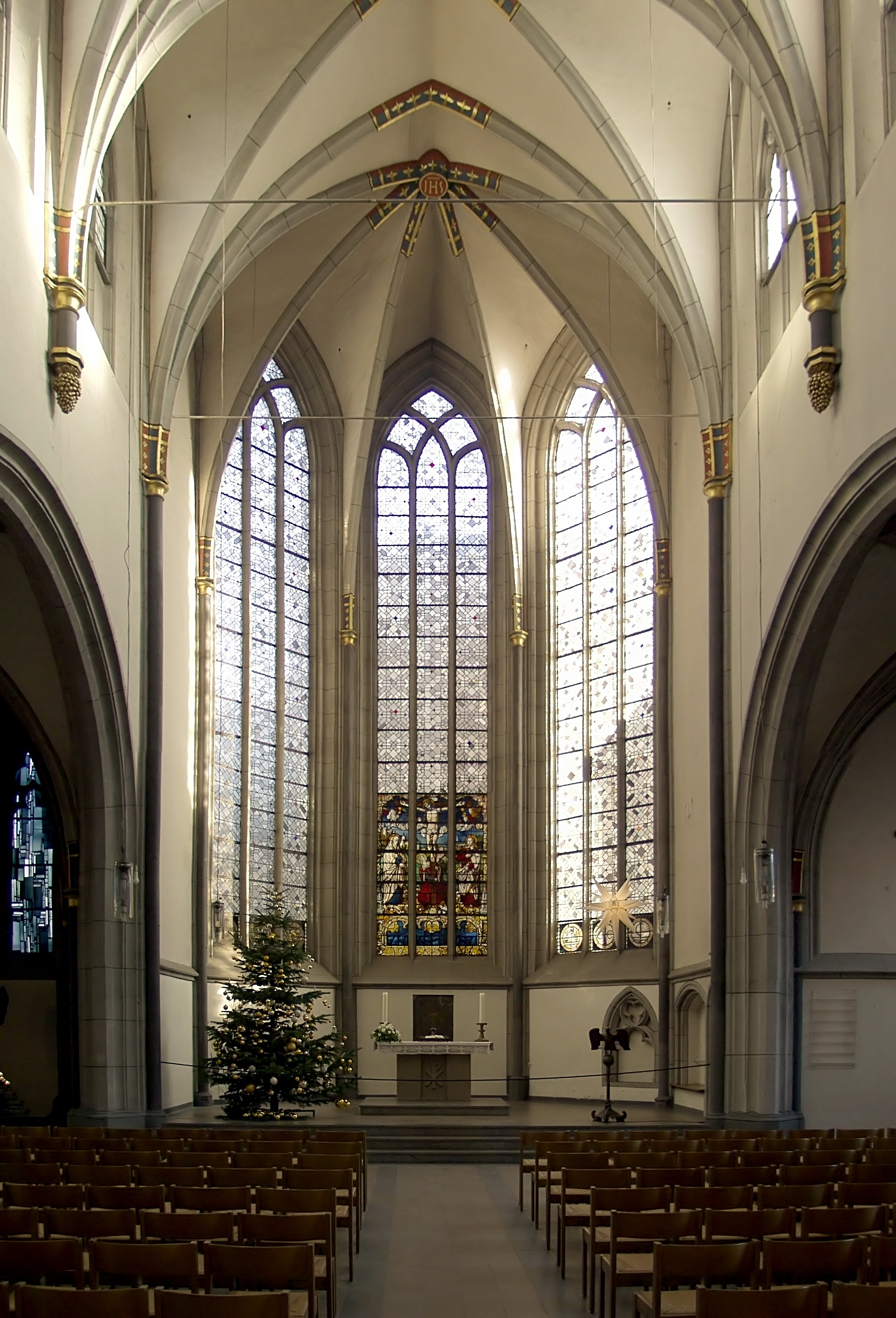 Antoniterkirche, Köln. Blick durch das Langhaus zum Altar/Ostchor